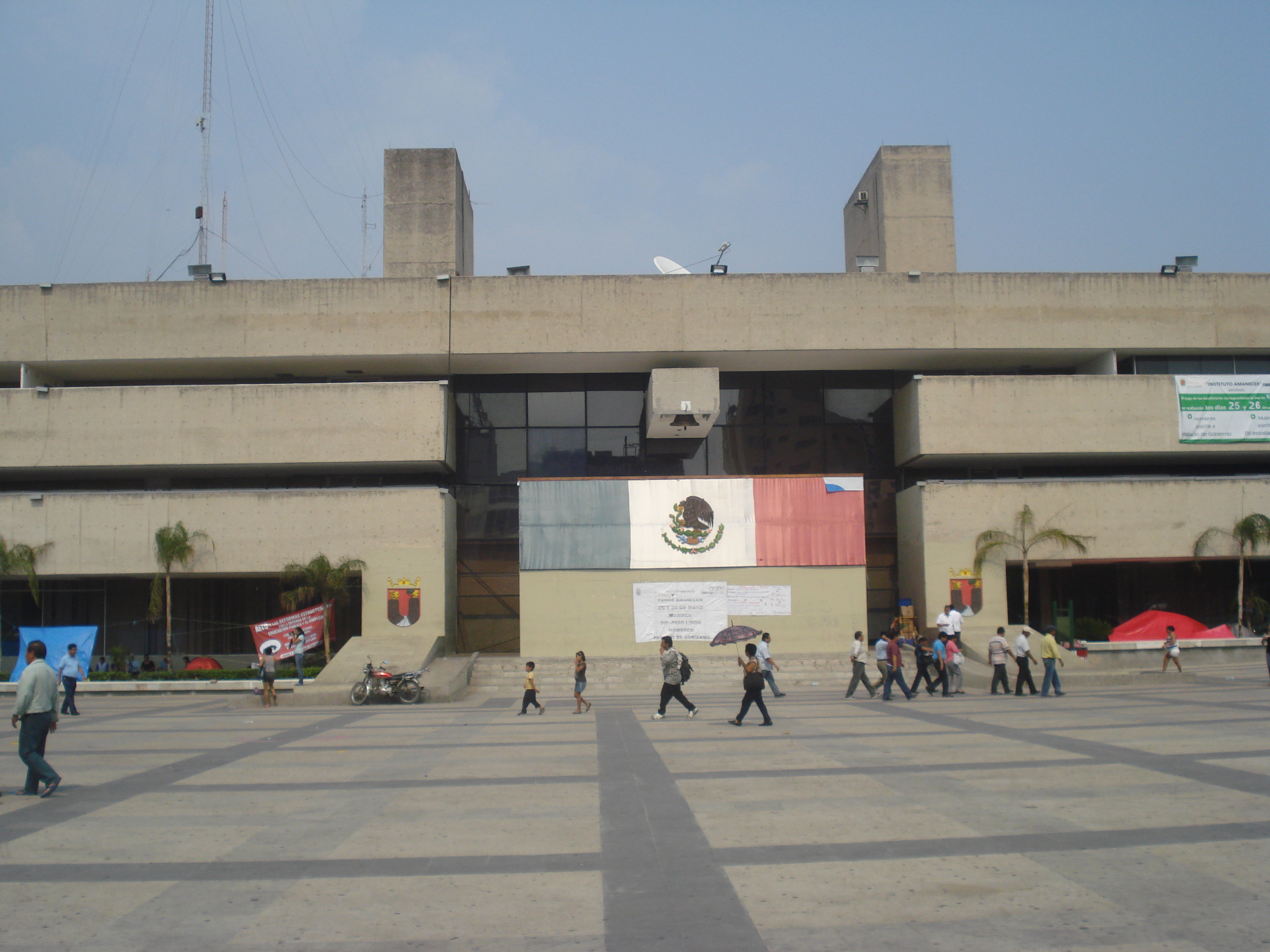 Palacio de Gobierno de Chiapas en Tuxtla.